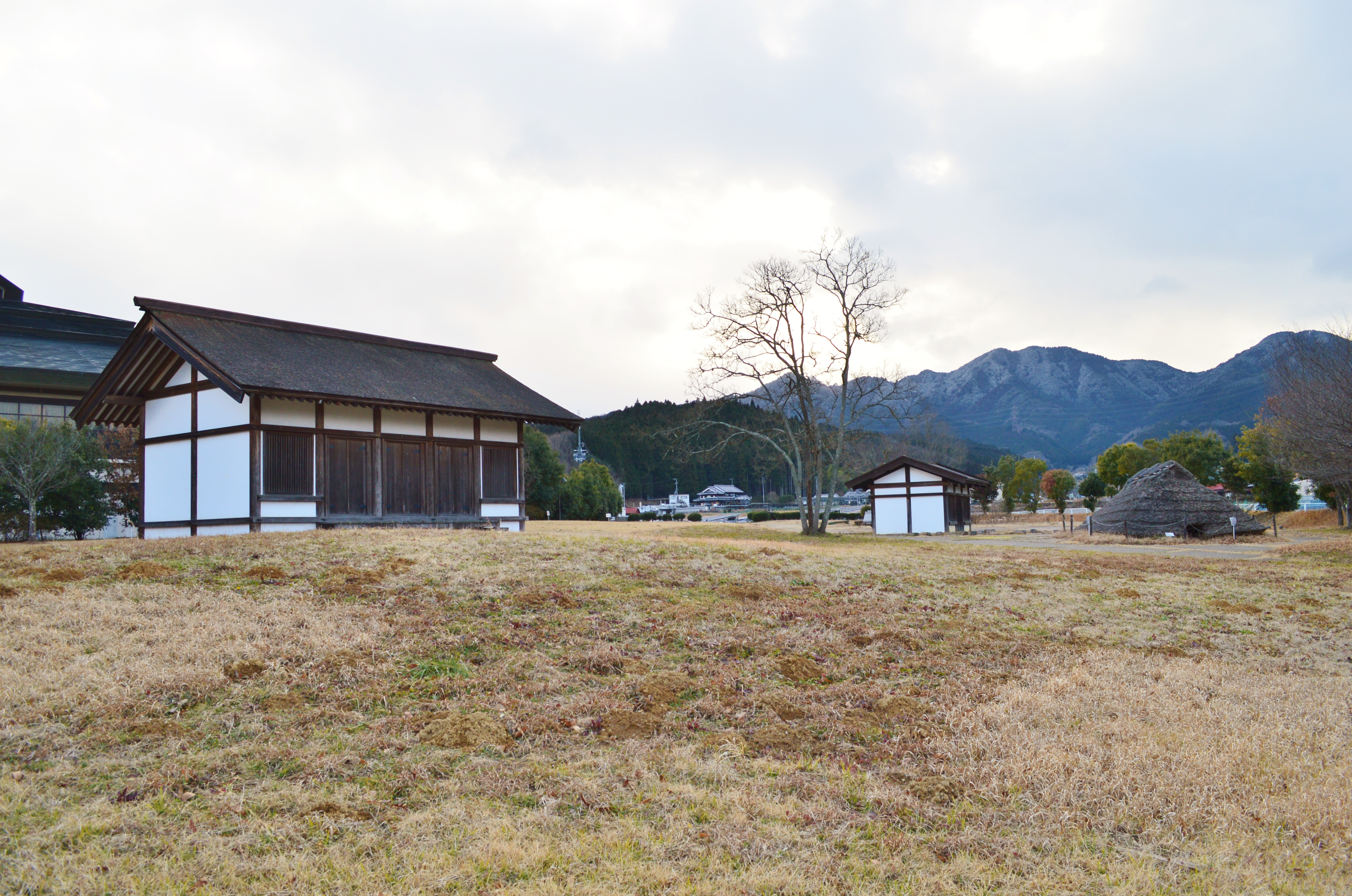 中之庄遺跡 (宇陀市) 概観